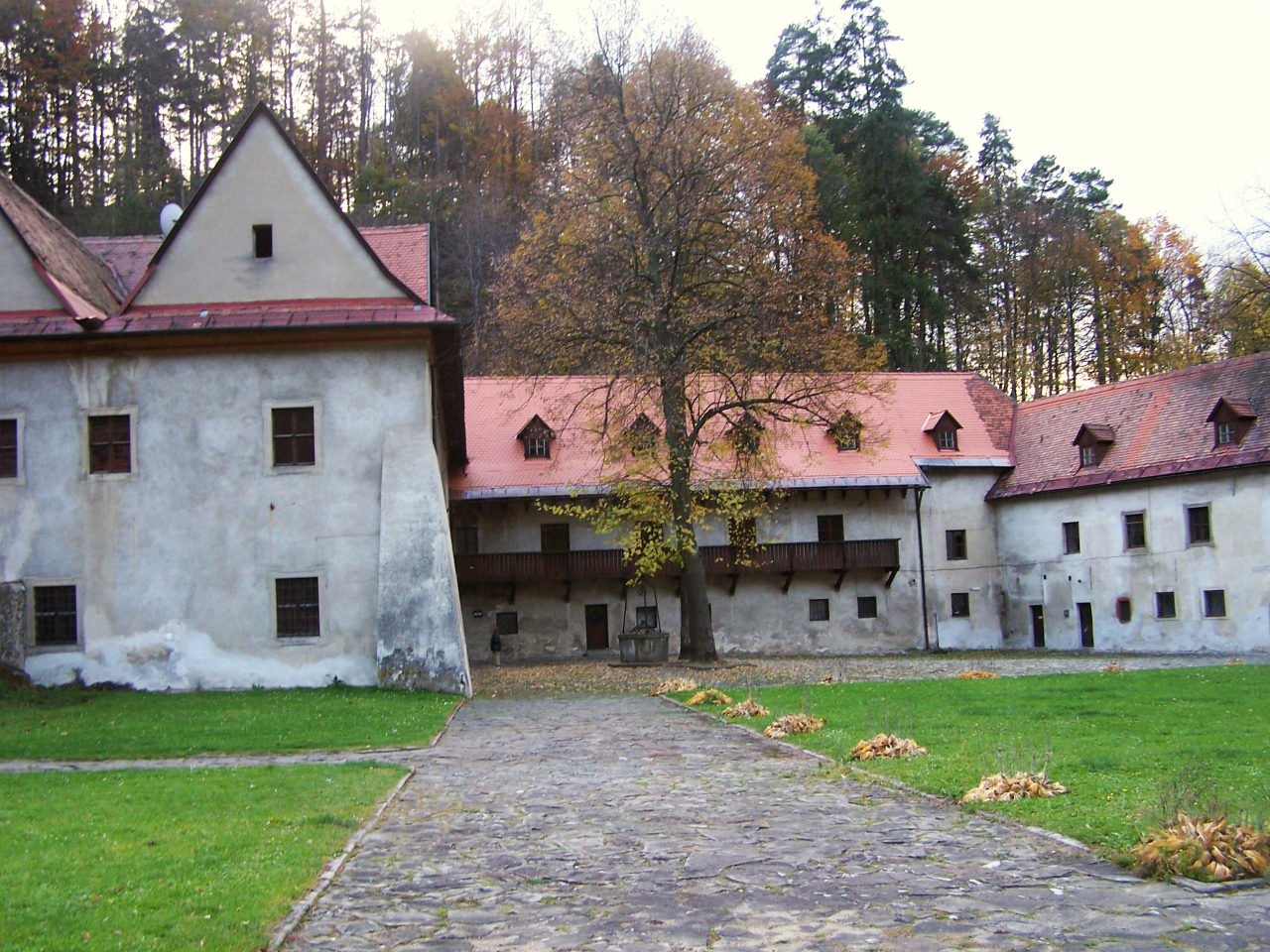 Czerwony Klasztor (Słowacja, Červený Kláštor)